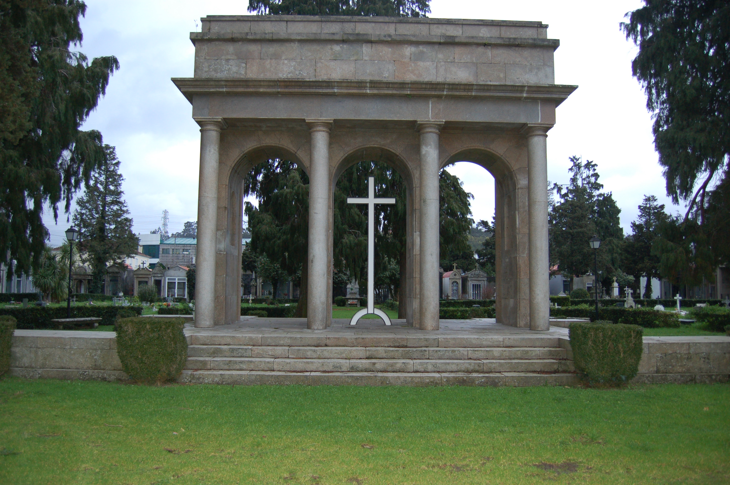 Panteón no Cemiterio de San Amaro de Pontevedra